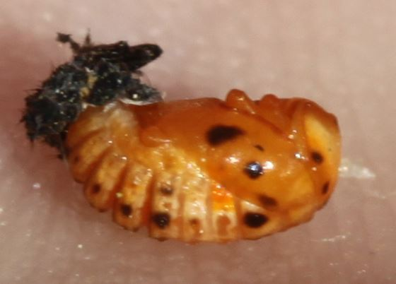 Puppe des Variablen Flach-Marienkäfers (Hippodamia variegata) am 25. Mai 2018